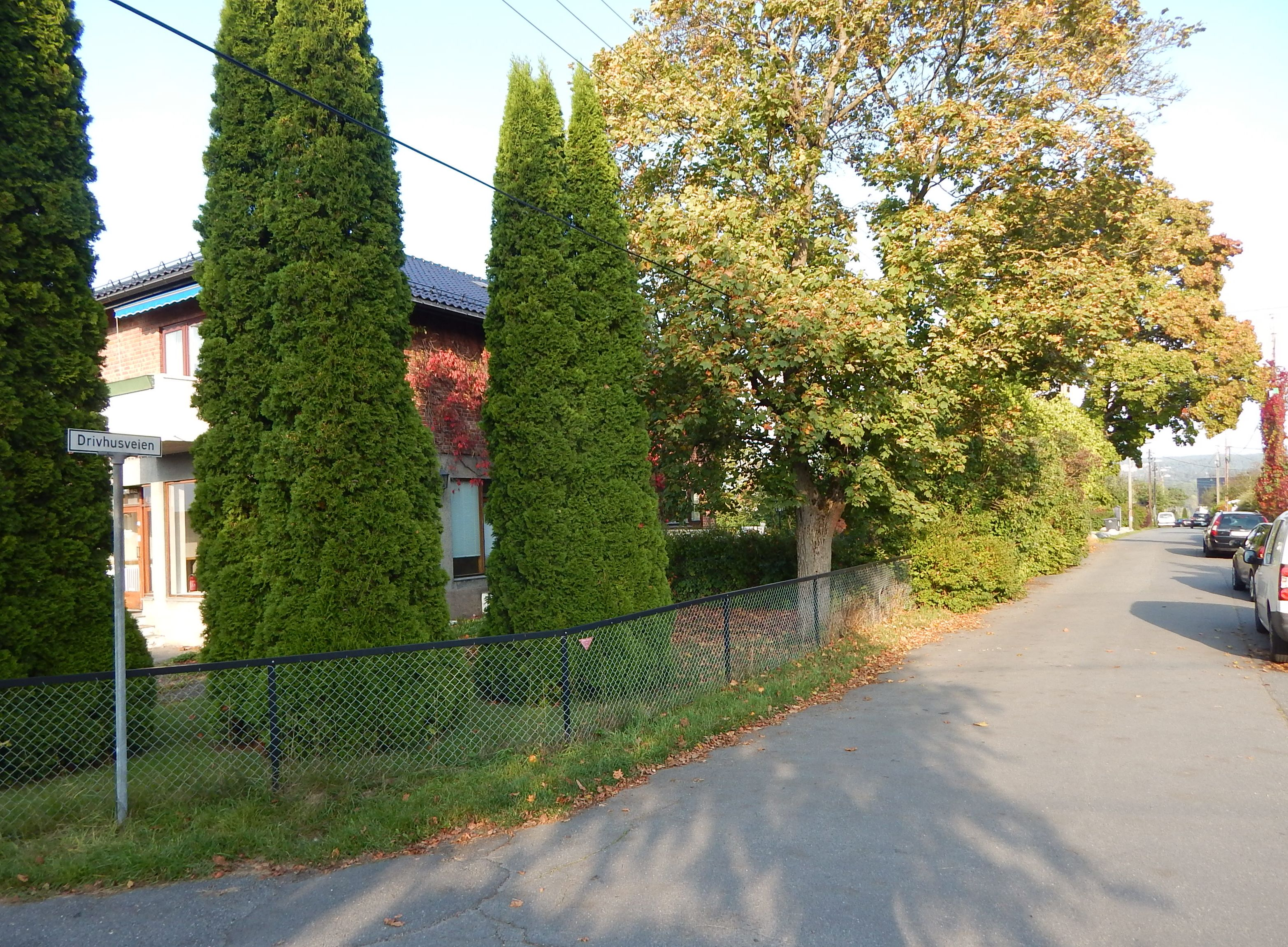 Drivhusveien